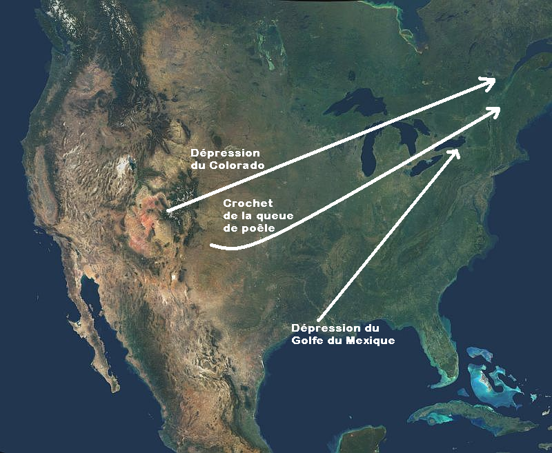 Trajectoire des dépressions de types Continental américain